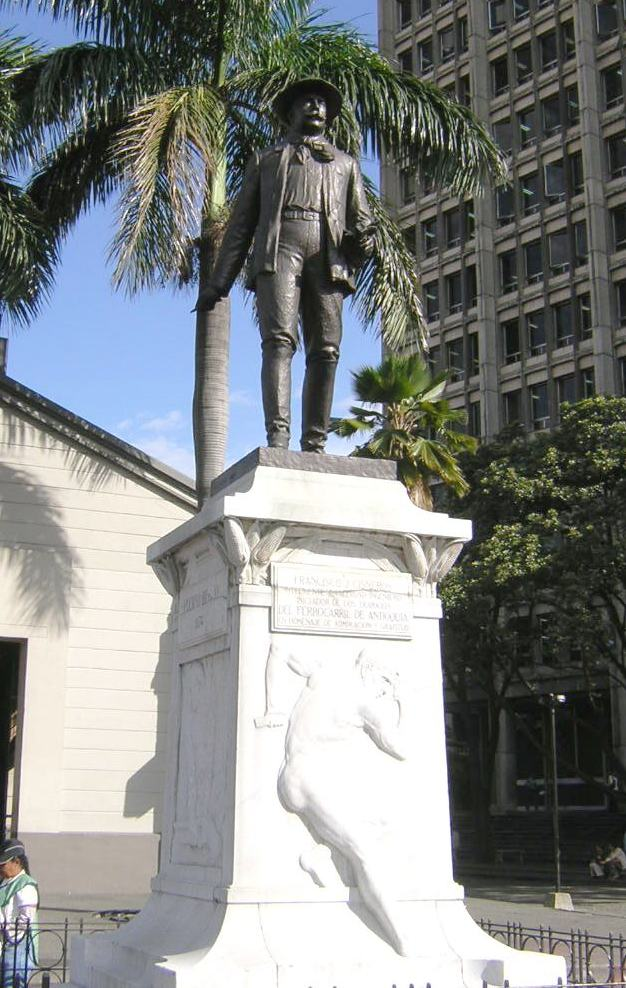 Estatua de Francisco Javier Cisneros, obra del maestro Marco Tobón Mejía, ubicada en la Estación Ferrocarril, Medellín, Colombia